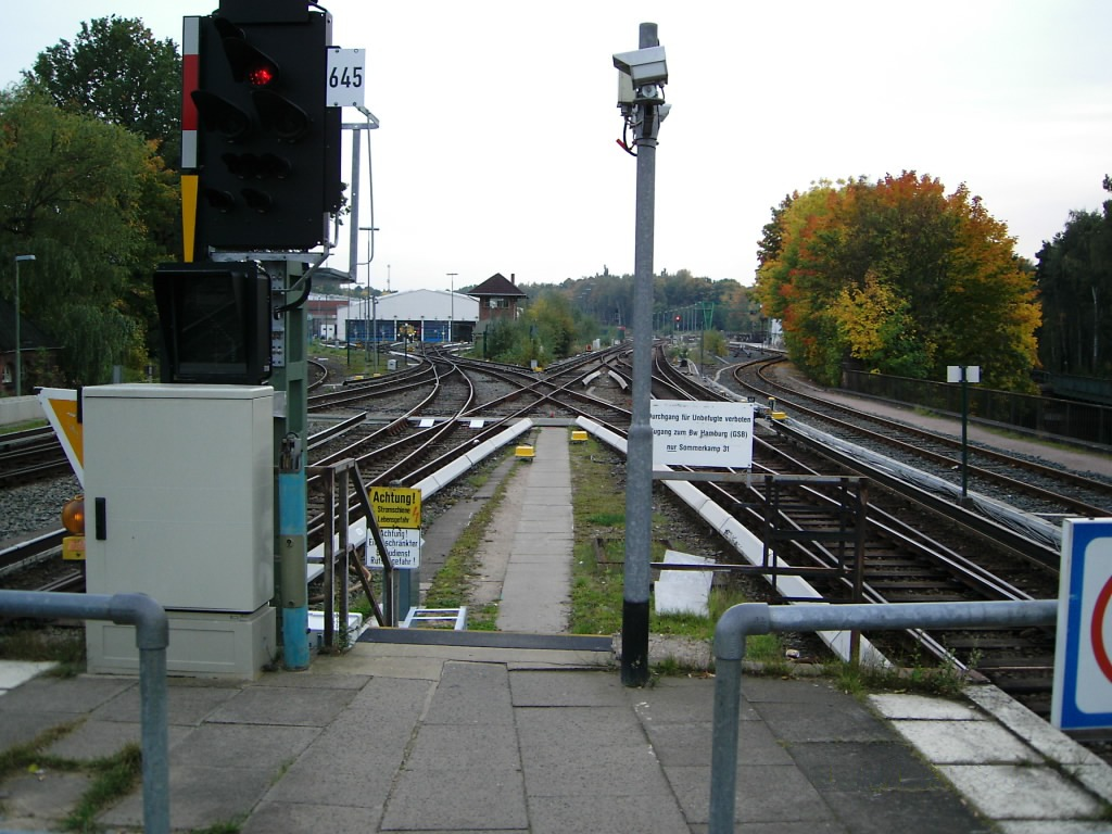 Ausfahrt Hamburg-Ohlsdorf Gleis 2 Richtung Barmbek